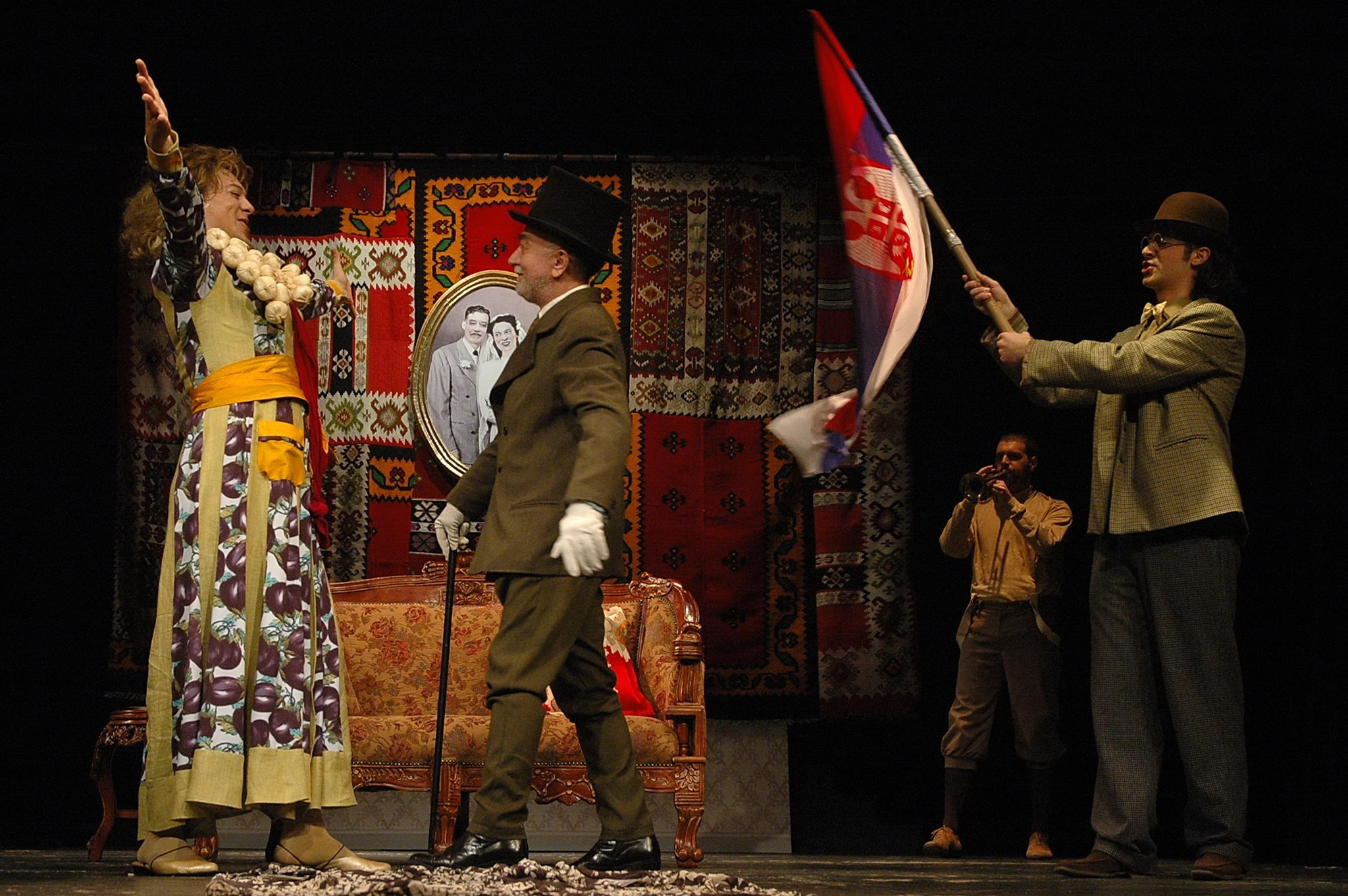 Српски (ћирилица): Сцене са премијере позоришне представе "Госпођа Министарка" у извођењу ансамбла позоришта Бошко Буха.